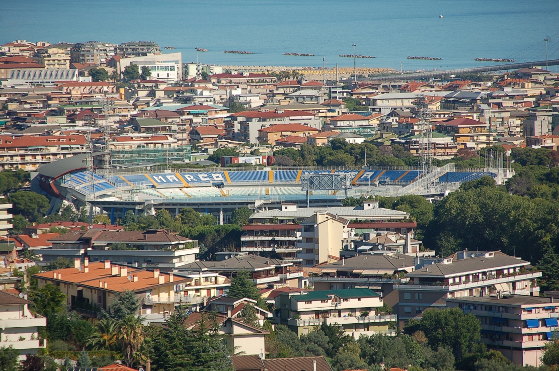 Pescara